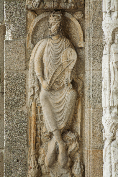 Cultural Heritage Spain RI-51-0000072